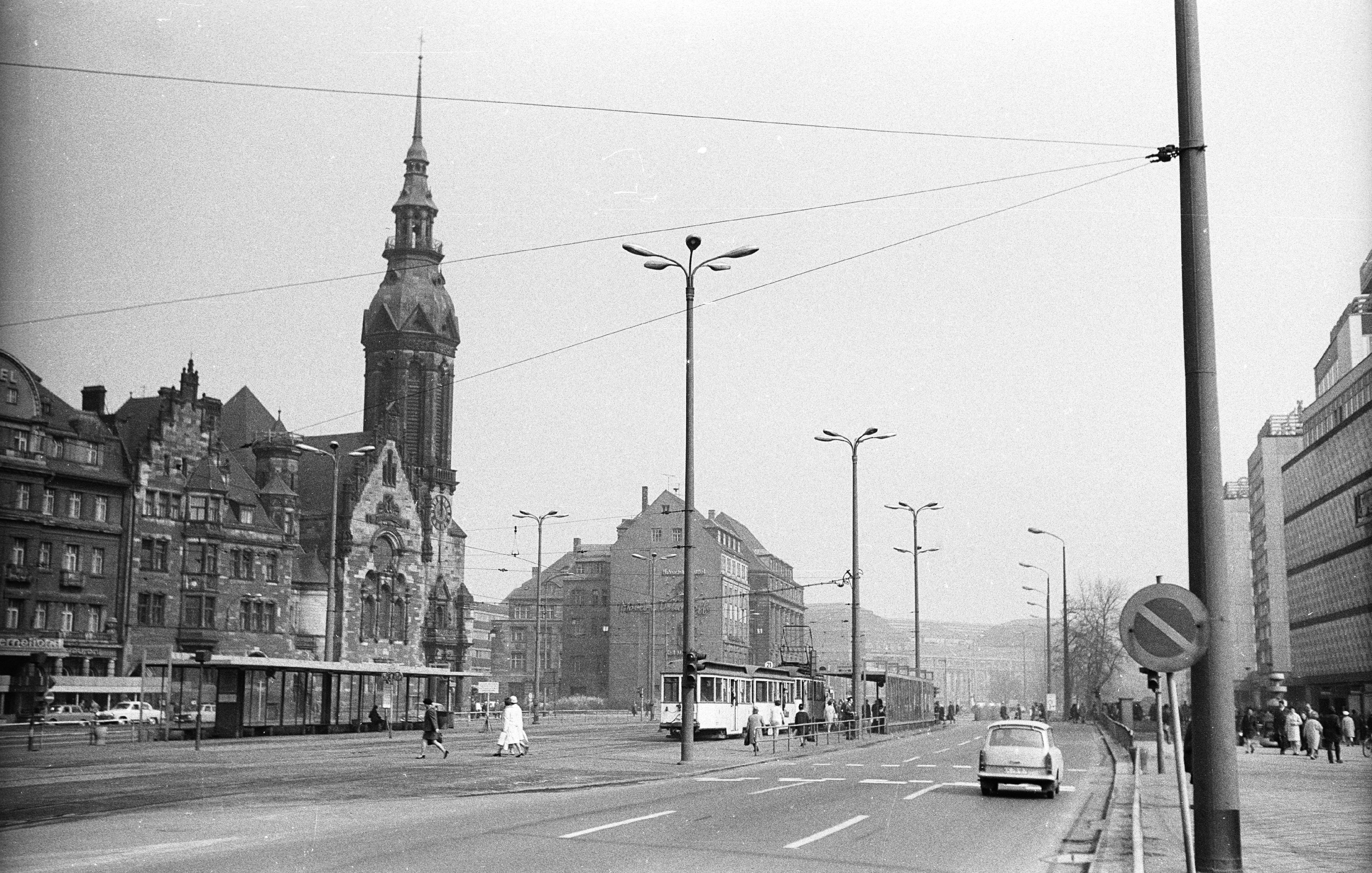 Richard Wagner Strasse a GoerdelerTröndlinring felől nézve. Location: Germany, Leipzig Title: Richard Wagner Strasse a GoerdelerTröndlinring felől nézve.